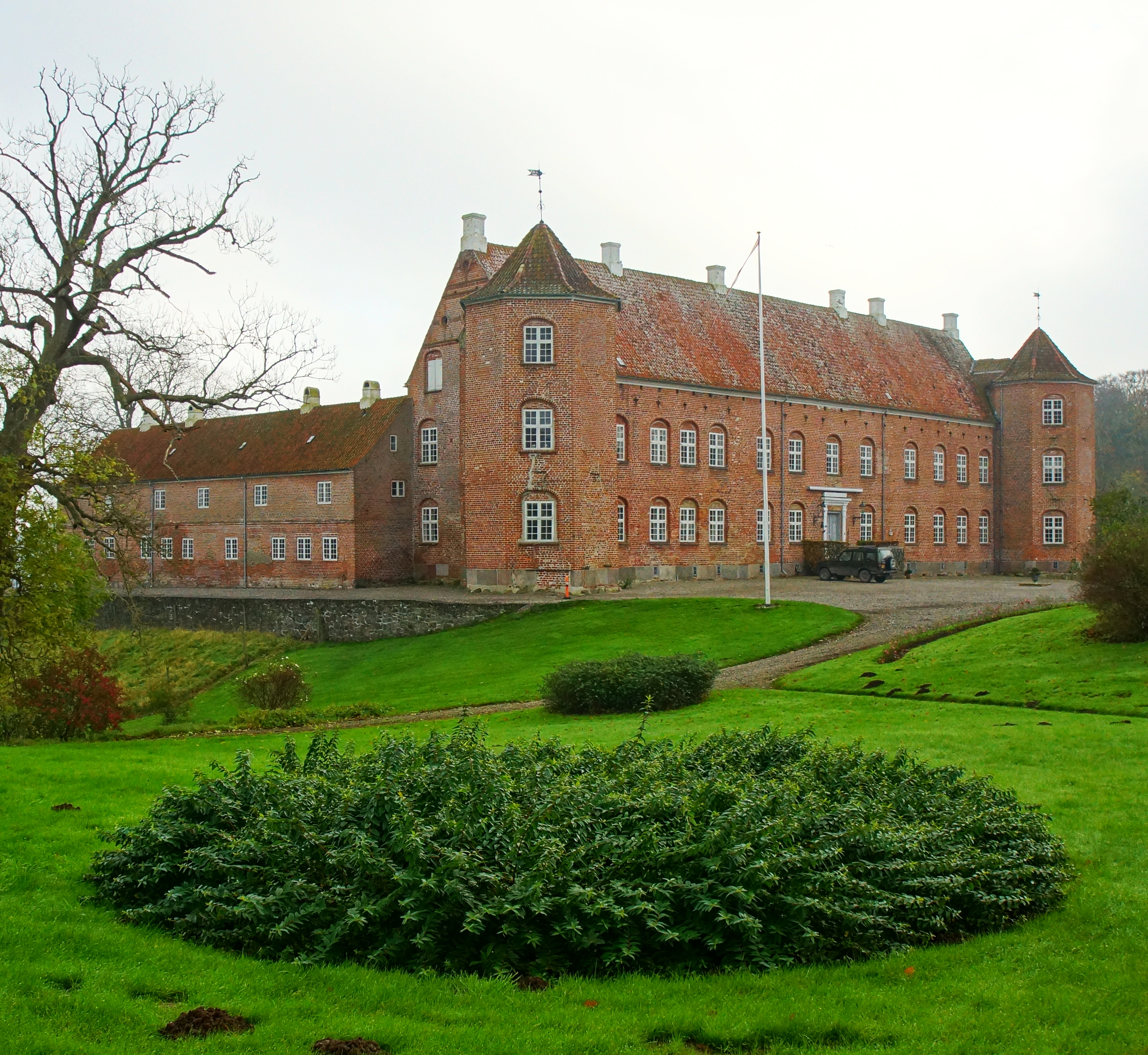 Rugård Slot, fra nord 6